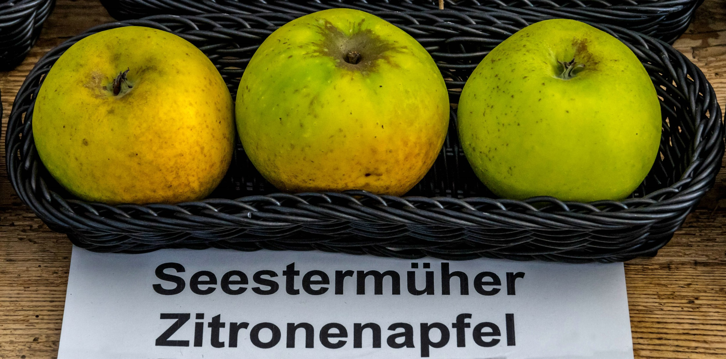 Alte Apfelsorten, von denen es im Badischen noch tragende Bäume gibt. Alle Aufnahmen au dem Oktober 2015